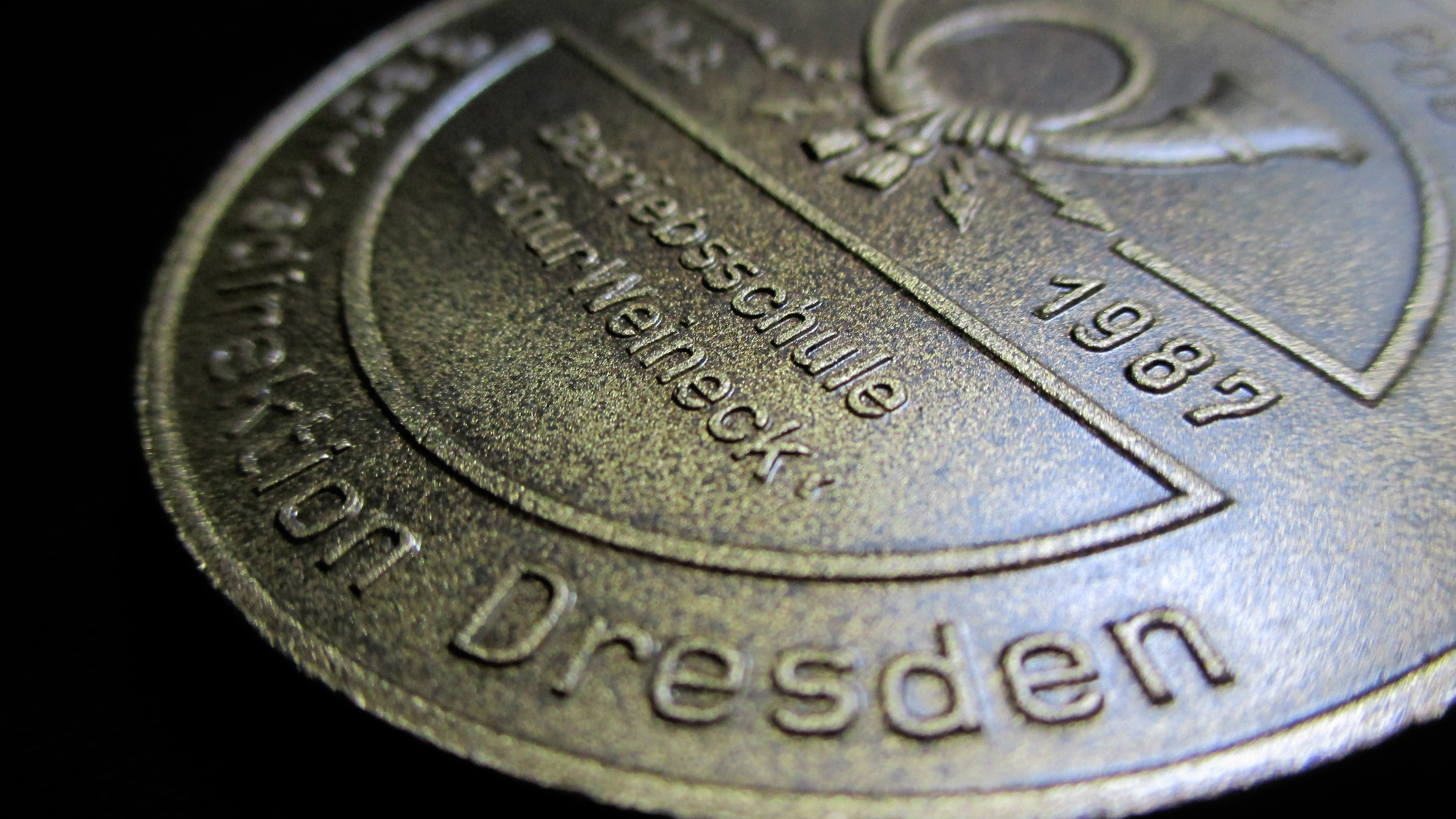 Deutsche Post (DDR) - Ehrenmedaille Arthur Weineck Bezirksdirektion Dresden - Betriebsschule - 1987 - Rückseite